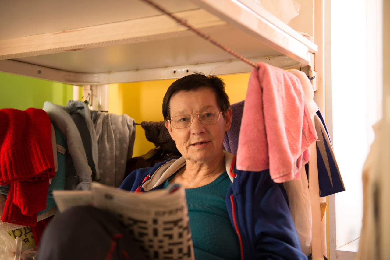 Одна комнат в реабилитационном приюте для бездомных людей на Боровой ул. 112Б